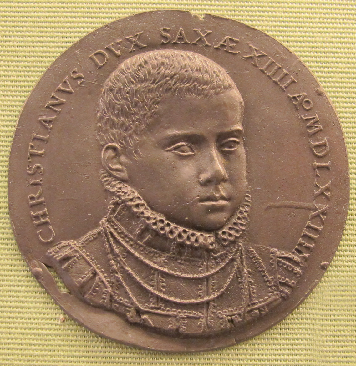 Cristiano del Sachsen, 1574